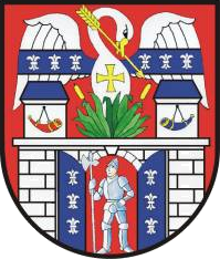 Rumburk - znak města